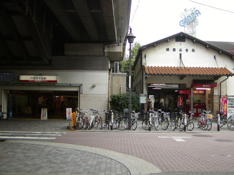 南海本線住吉大社駅・テナント街「ショップ南海住吉」出入口（写真左側）、阪堺電軌上町線住吉公園駅駅舎（写真右側）。2007年6月、大阪市住吉区で投稿者が撮影。